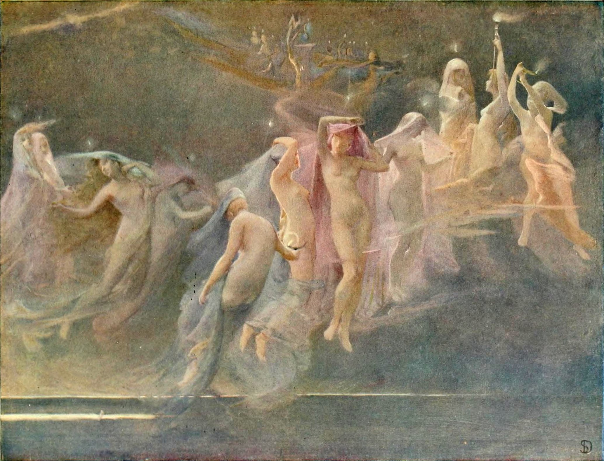 Les Étoiles du Matin